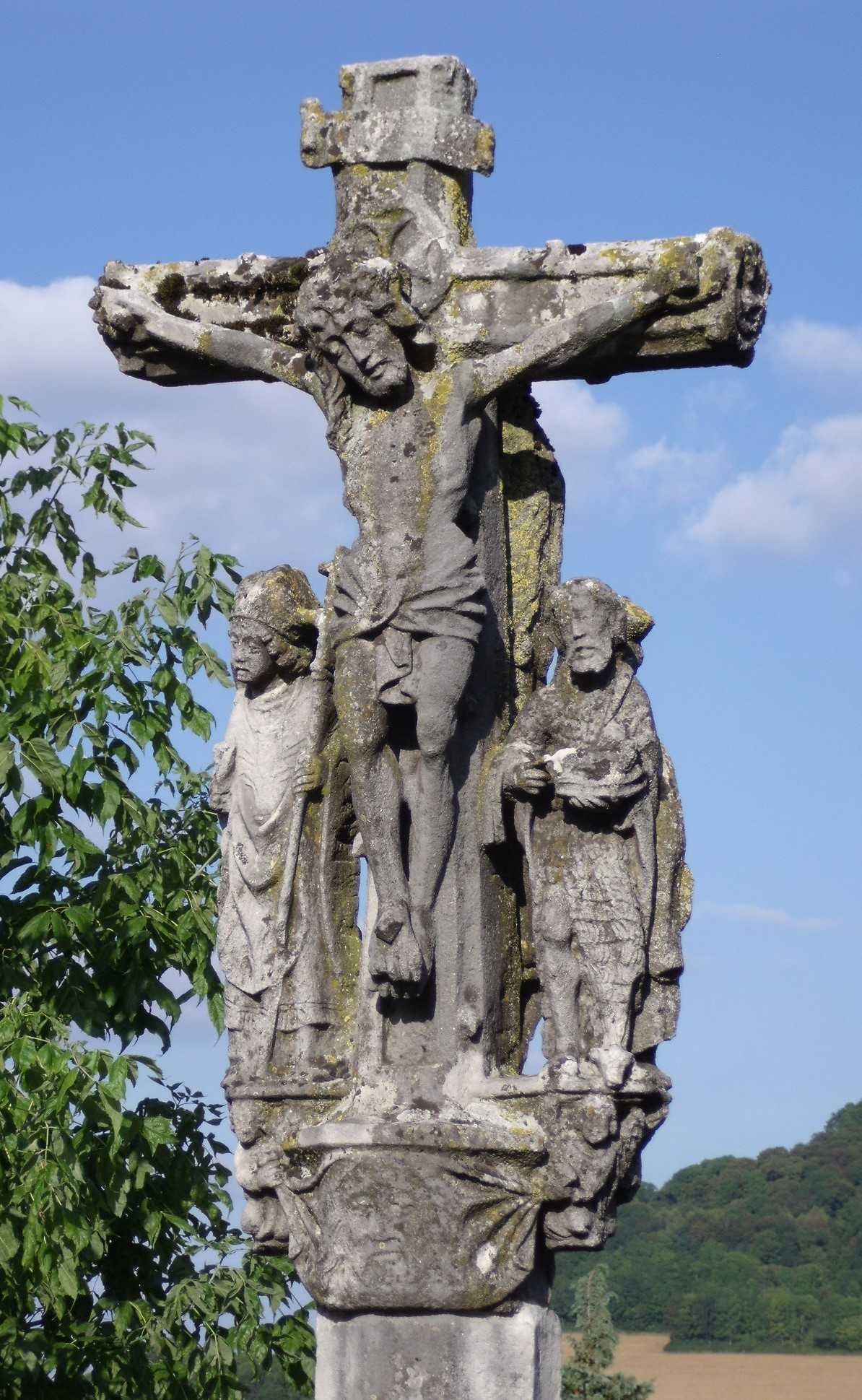 Croix de cimetière de Fécocourt du 16e siècle classée en 1919 .